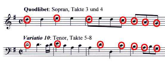 Kernmelodie der Bergamasca in Quodlibet und Variatio 10 der Goldberg-Variationen von J. S. Bach